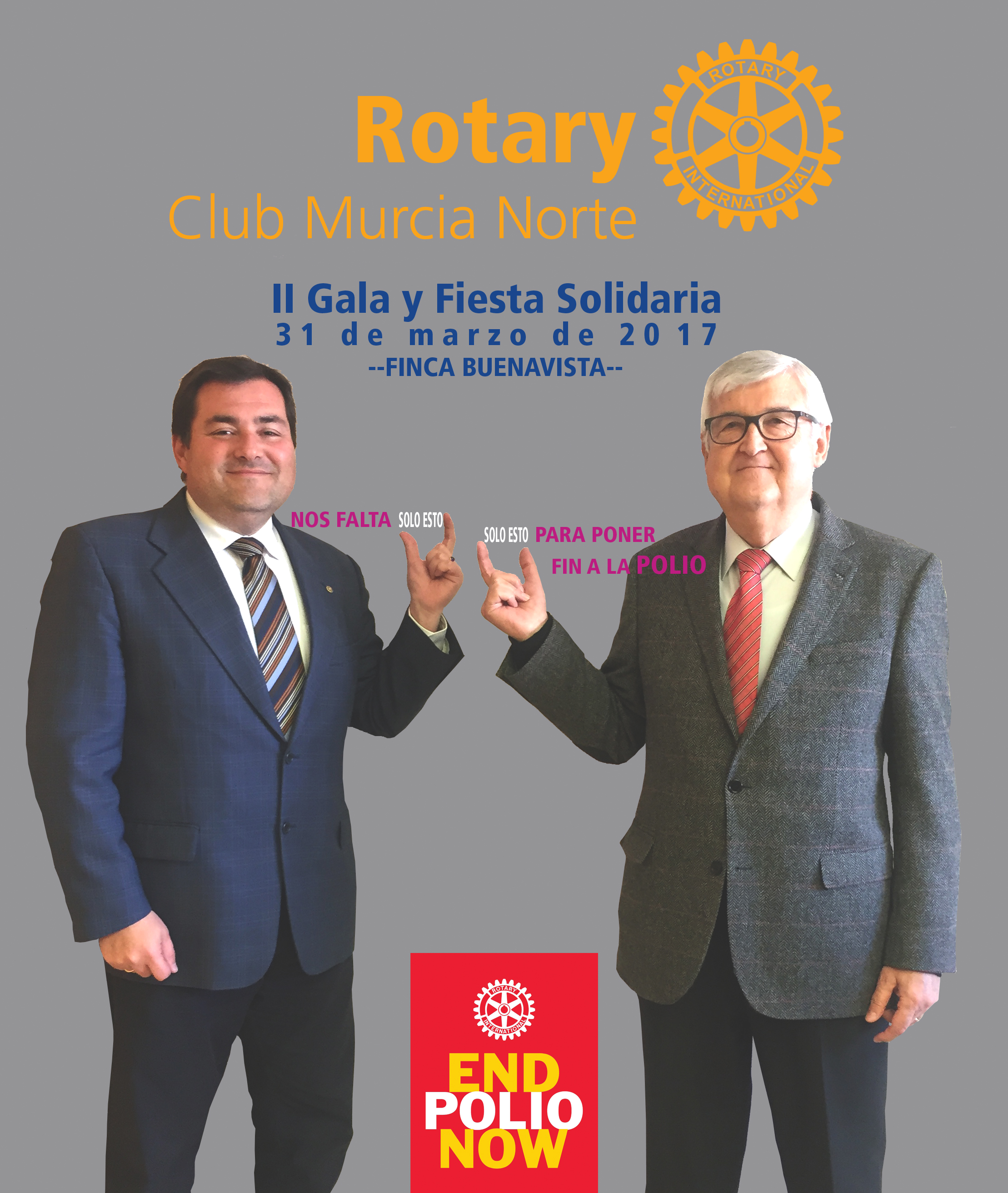 Desde Rotary Club Murcia Norte se ha lanzado una campaña de concienciación y recaudación de fondos para luchar contra la Polio